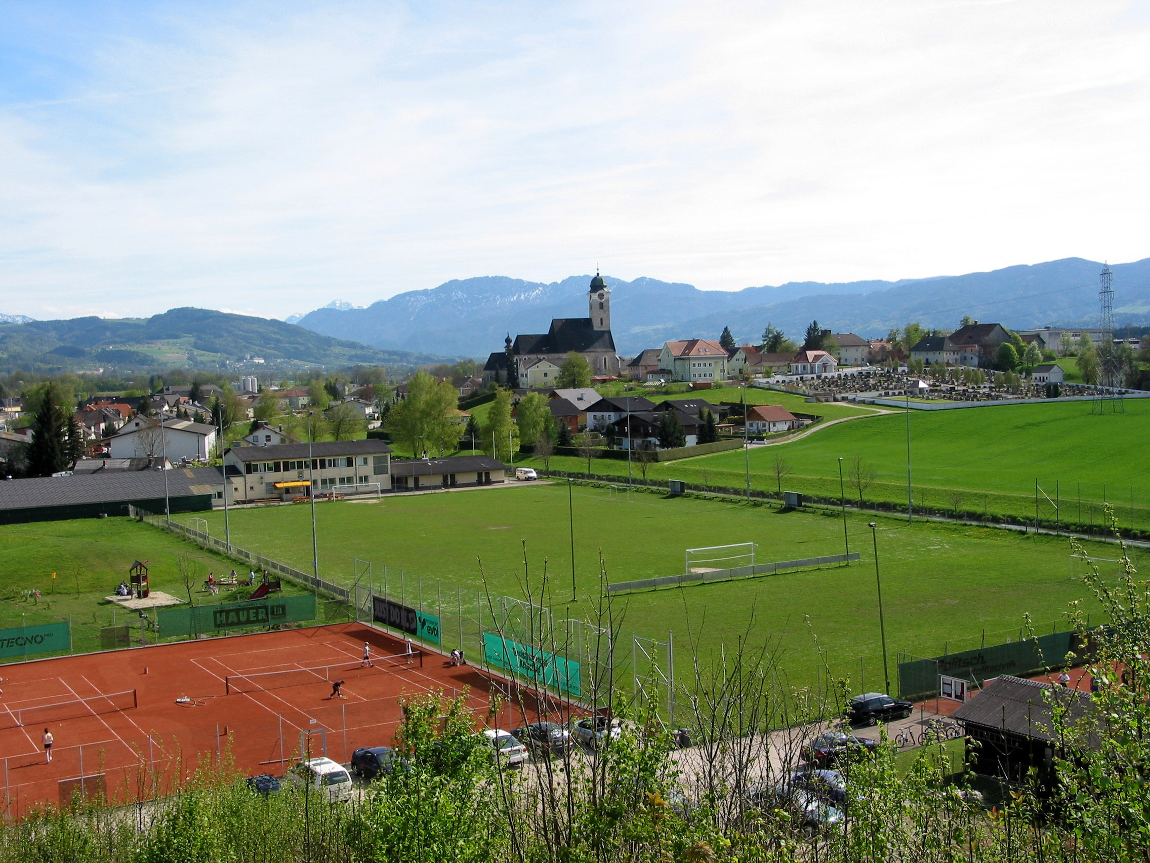 Wartberg an der Krems